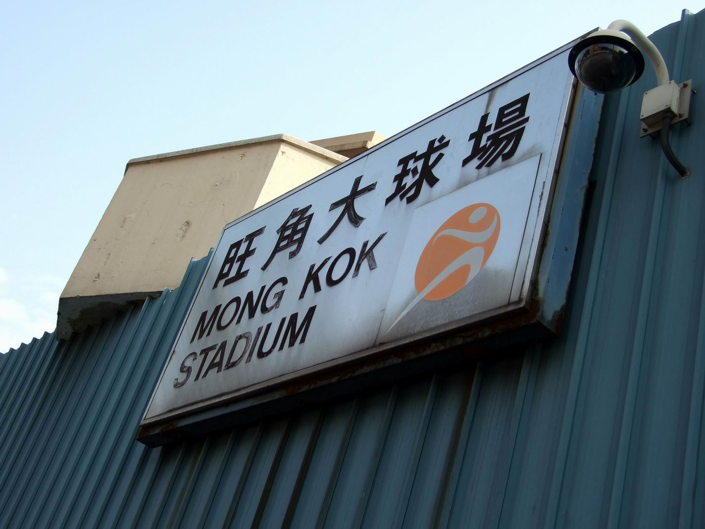 旺角球場